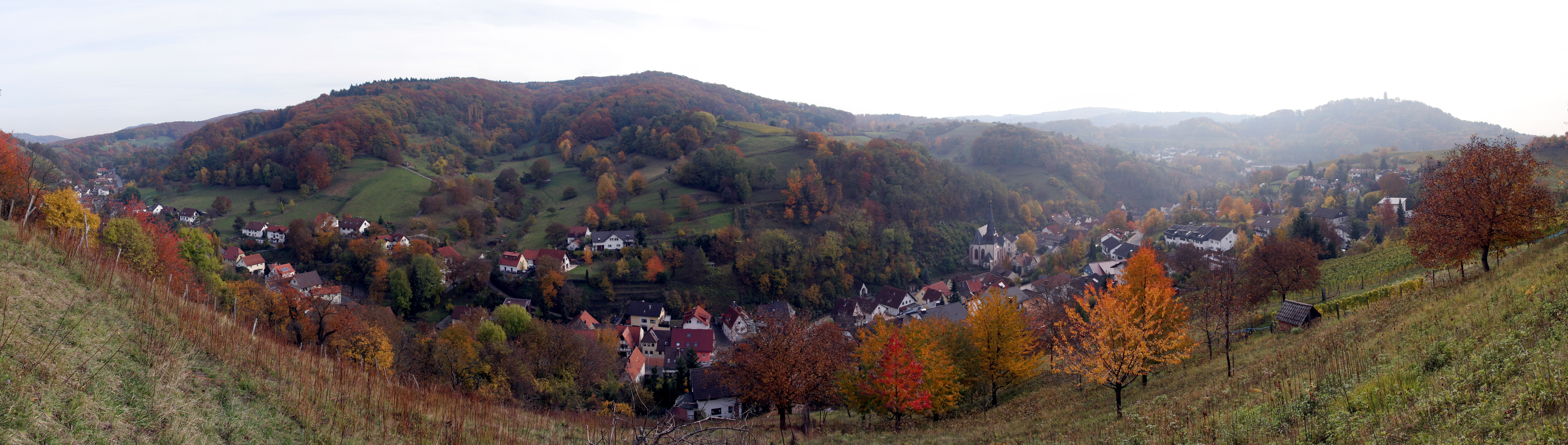 Der Heppenheimer Stadtteil Unter-Hambach. 180° Panorama, aus sechs Einzelbildern zusammengesetzt. Aufnahmepunkt: Waldrand an der Hubenhecke